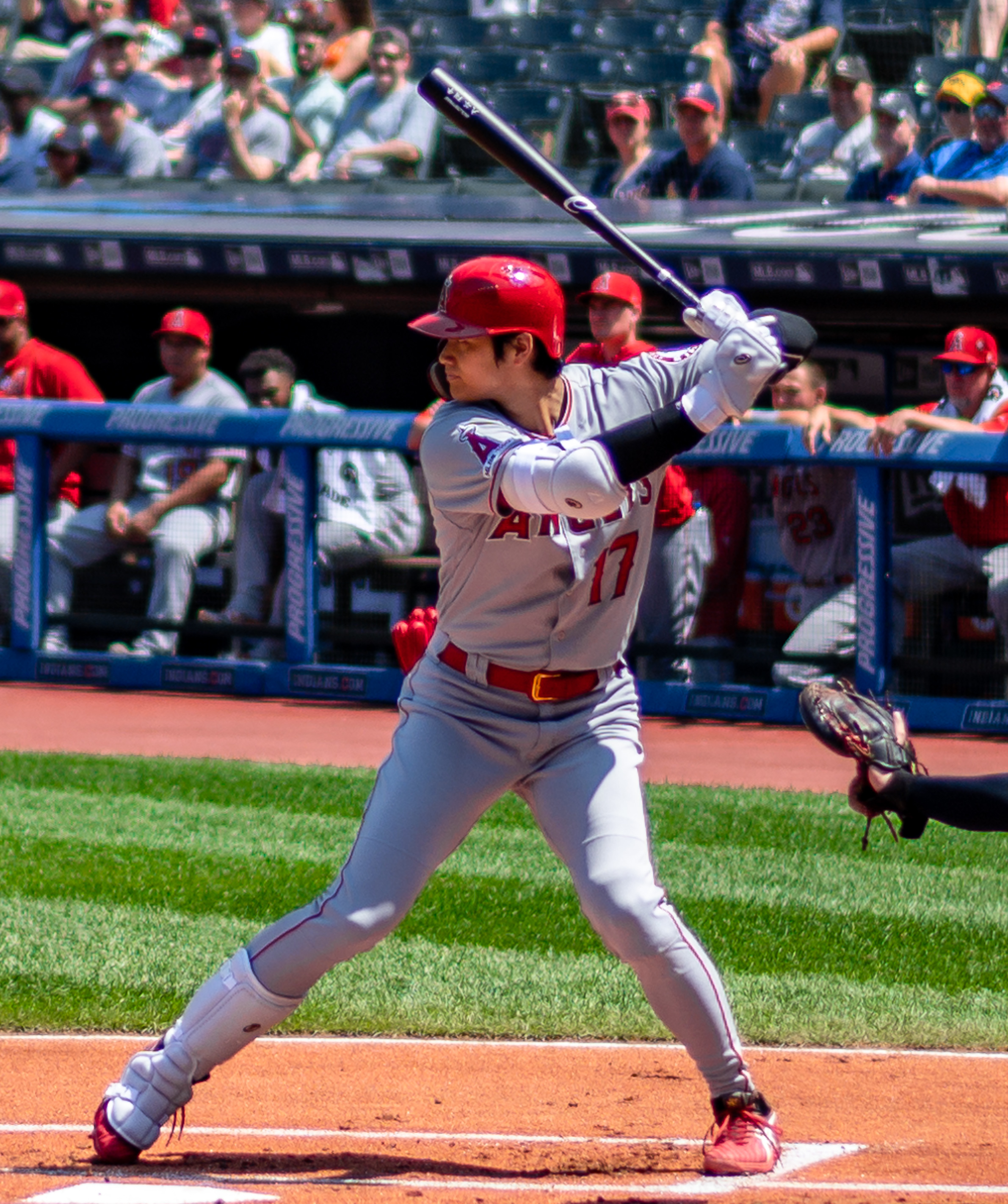 Shohei Otani